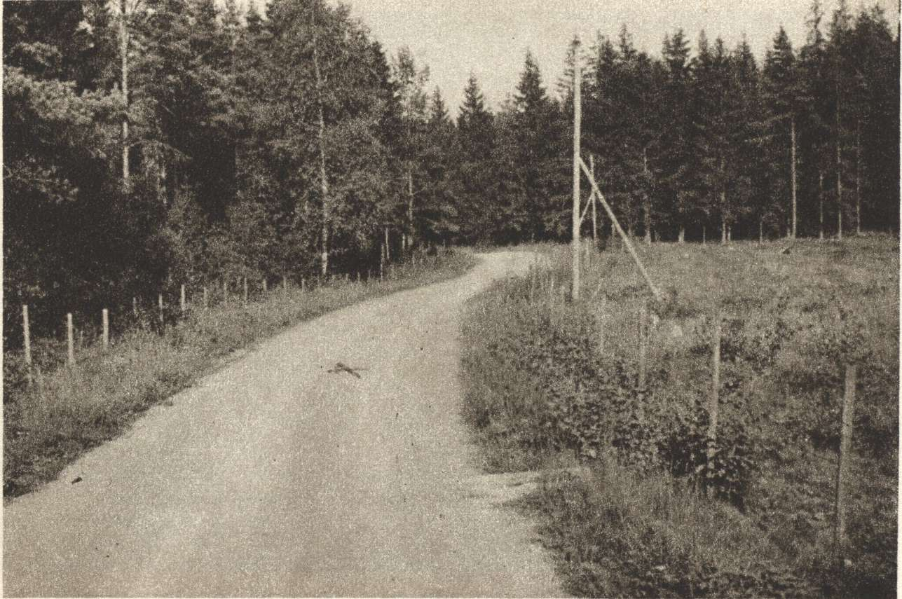 Mommilan veritekojen murhapaikka Hausjärvellä